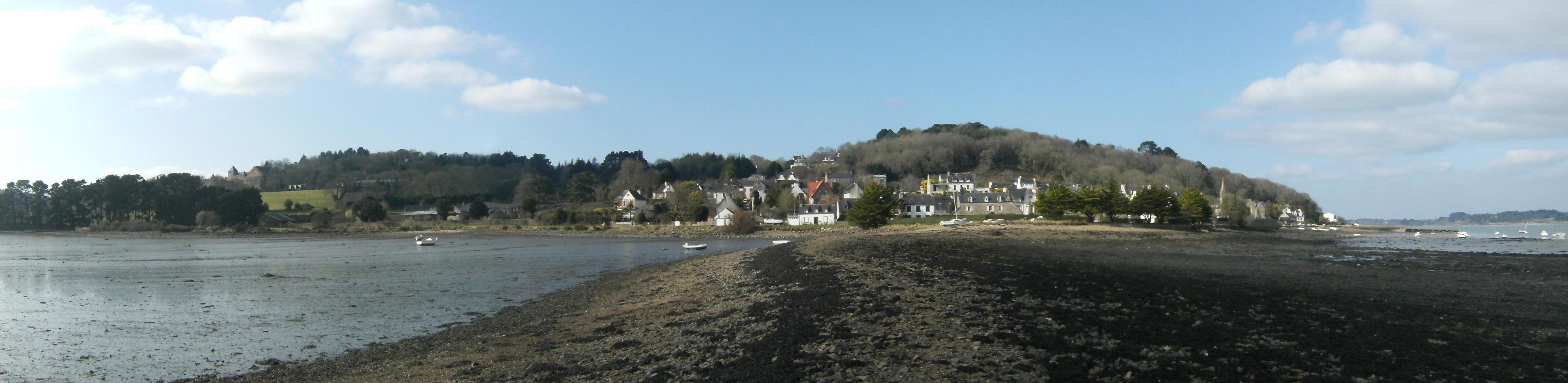 Panorama du village de Landévennec. De l'abbaye Saint Guénolé à gauche jusqu'au port de Landévennec à droite.